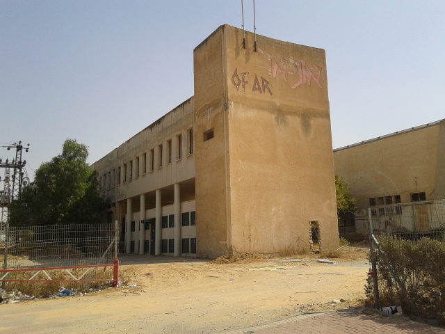 אגף המשרדים במפעל אופ-אר באופקים. המפעל נטוש והרוס